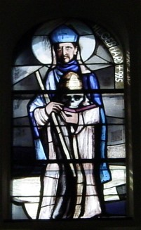 eines der 32 Kirchenfenster in der Pfarrkirche Liesing (Wien 23) gestaltet von Martin Häusle. selbst fotografiert Erstellungssatum: März 2007